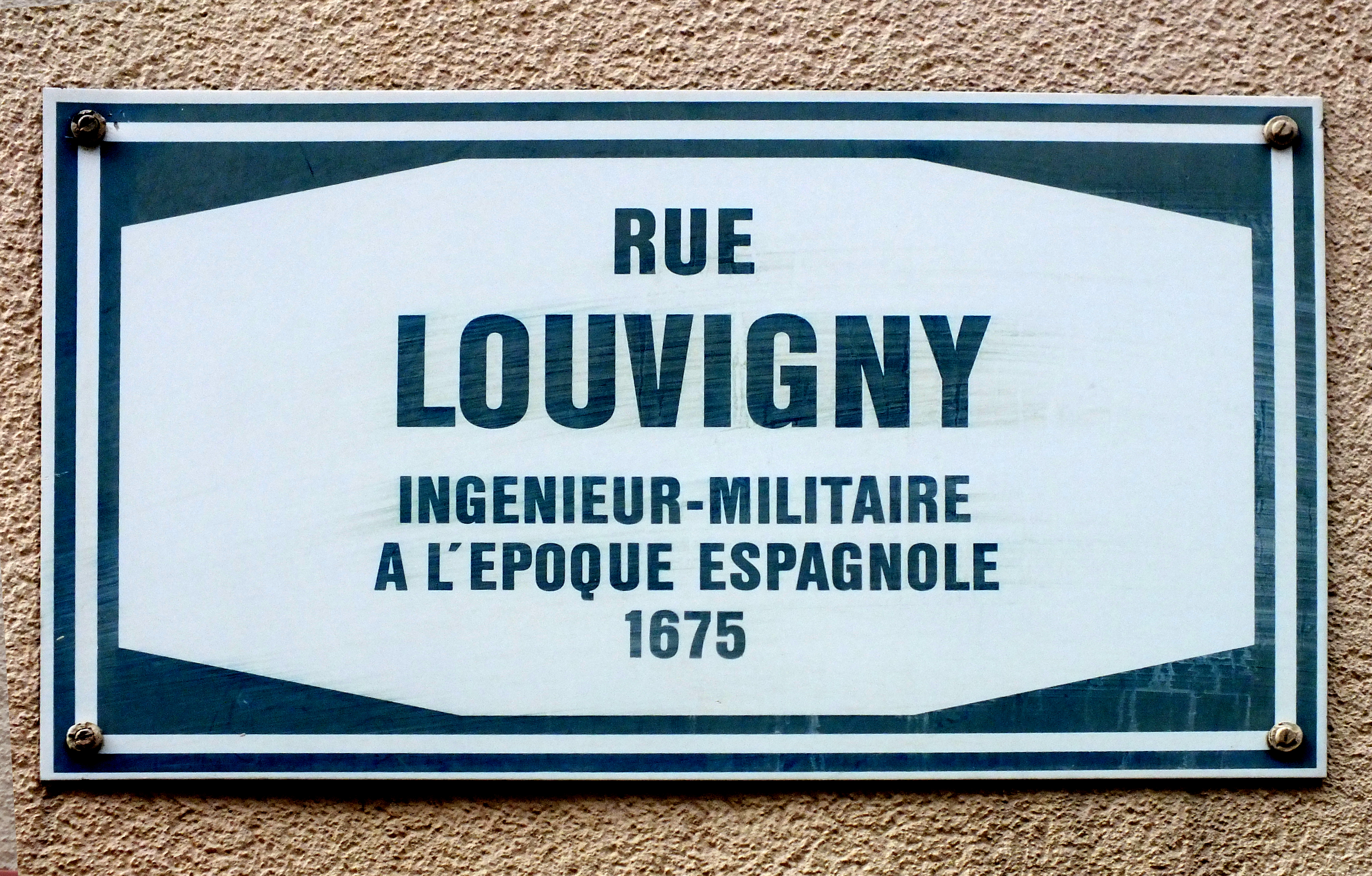 D'Stroosseschëld rue Louvigny an der Stad.